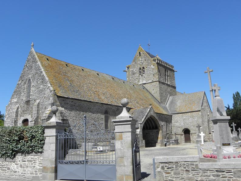 Vue méridionale de l'église Notre-Dame de Genêts (50).